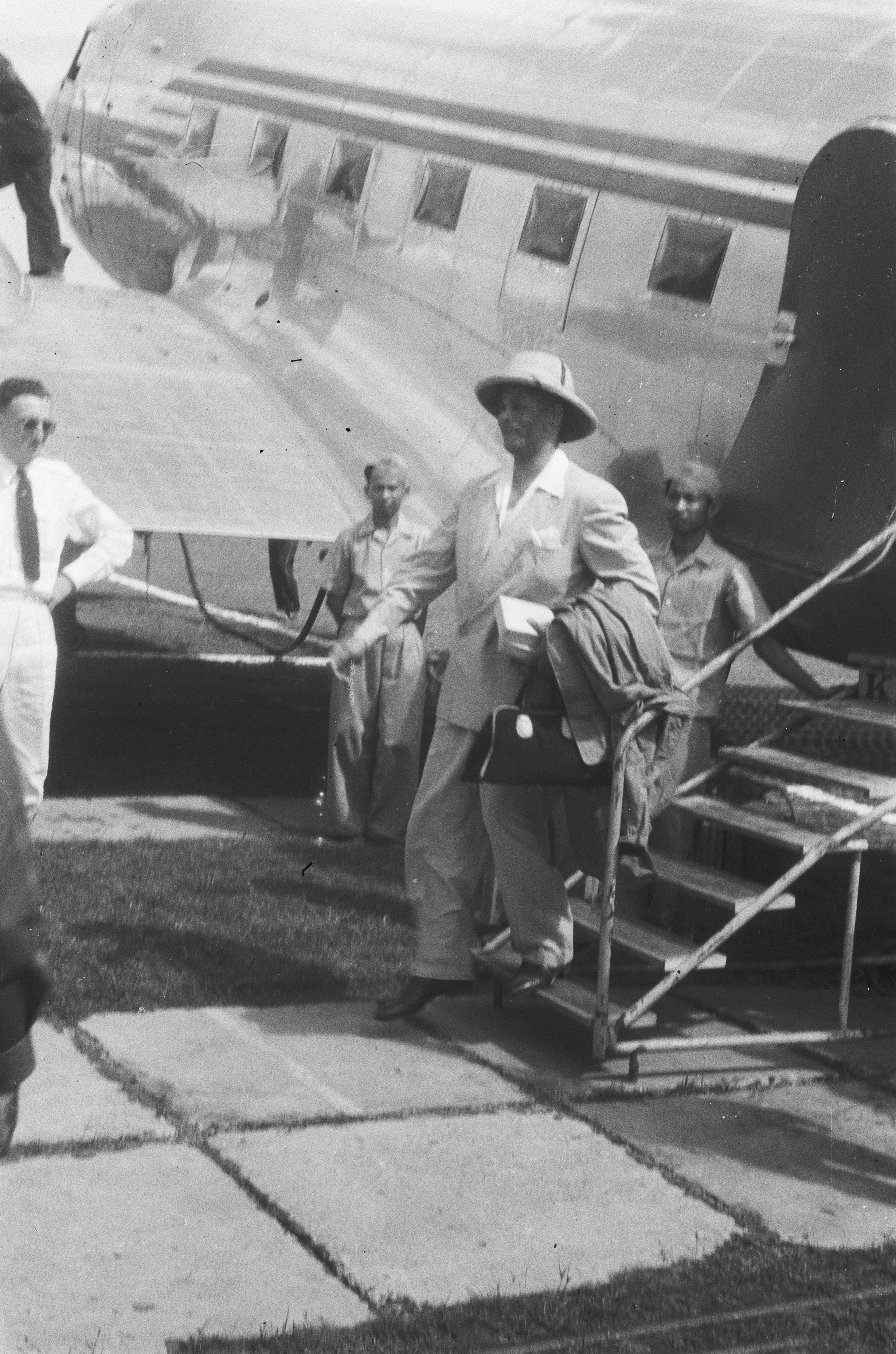 Collectie / Archief : Fotocollectie Dienst voor Legercontacten Indonesië Reportage / Serie : [DLC] Bezoek kolonel Julian aan Indonesië Beschrijving : Medan. Aankomst van kolonel Julian Annotatie : De zwarte Amerikaans kolonel b.d. Hubert F. Julian, een voormalige piloot met de bijnaam "Black Eagle" bezocht als journalist Indonesië. Hij was fel anti-communistisch en steunde de Nederlandse houding in het conflict. Datum : januari 1949 Locatie : Indonesië, Nederlands-Indië, Yogyakarta Fotograaf : Kalken, van / DLC Auteursrechthebbende : Nationaal Archief Materiaalsoort : Negatief (zwart/wit) Nummer archiefinventaris : bekijk toegang 2.24.04.03 Bestanddeelnummer : 509-2-2